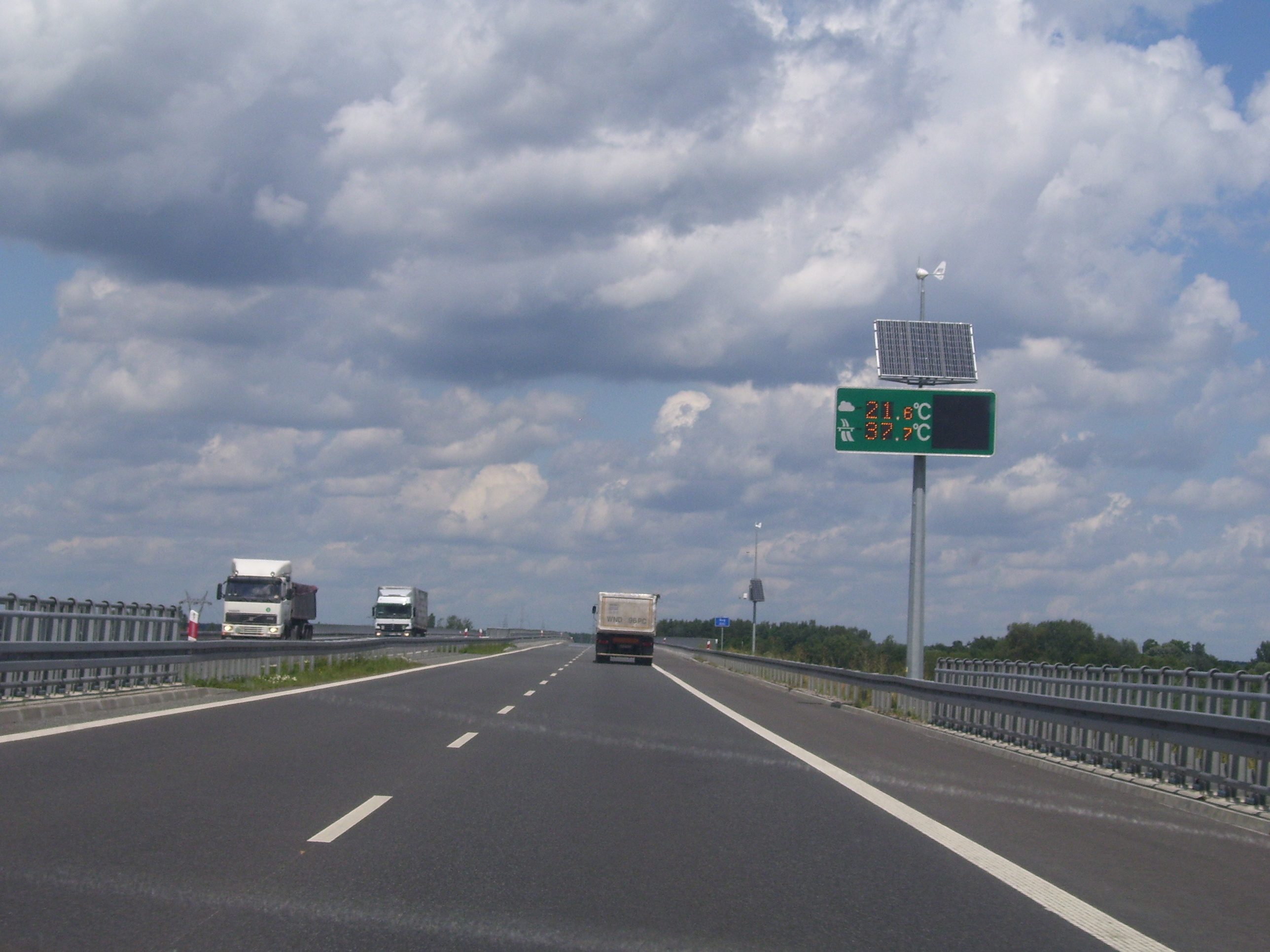 Most nad Bugiem na obwodnicy Wyszkowa